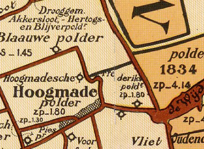 Frederikspolder